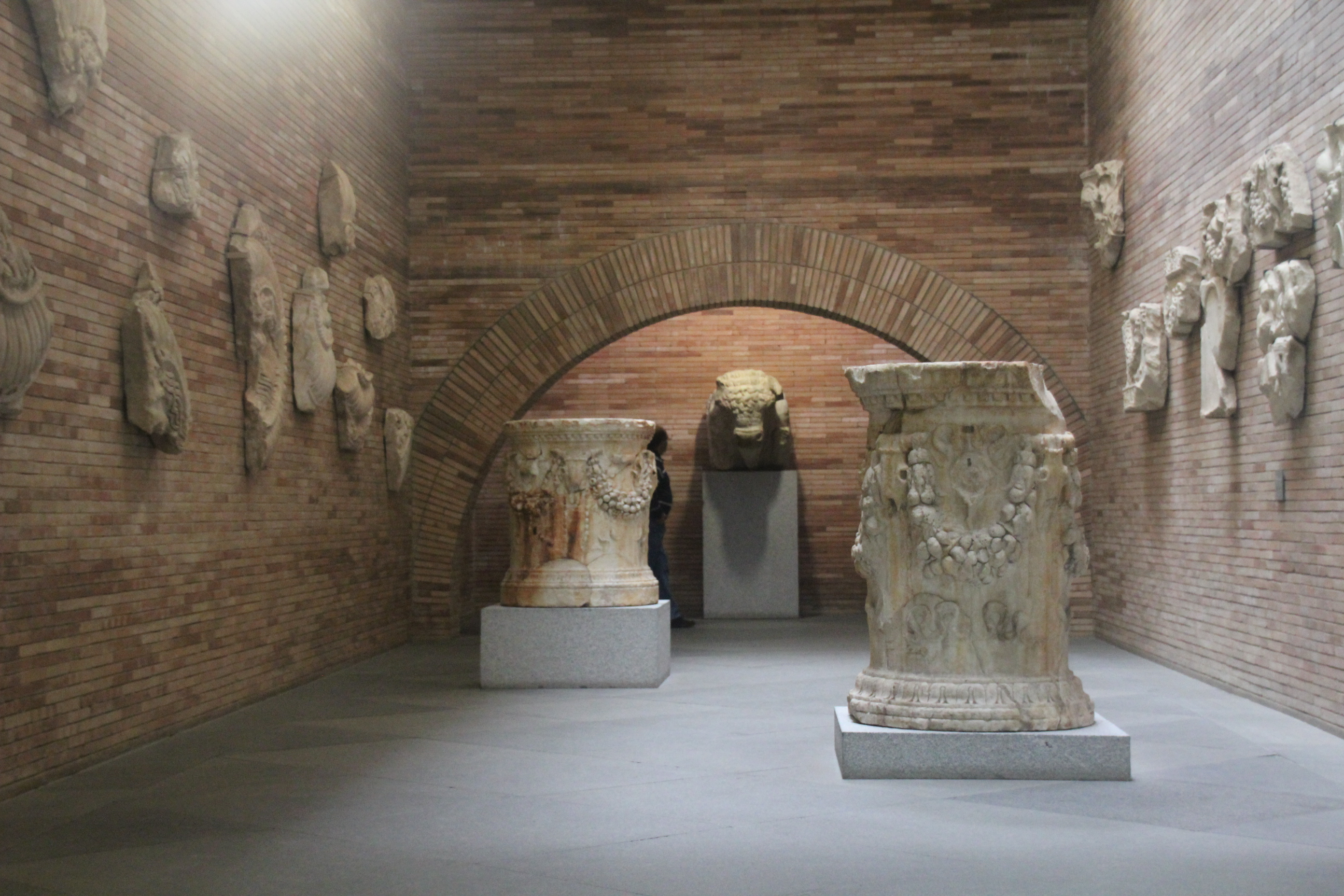 Escultura en Museo Nacional del Arte Romano